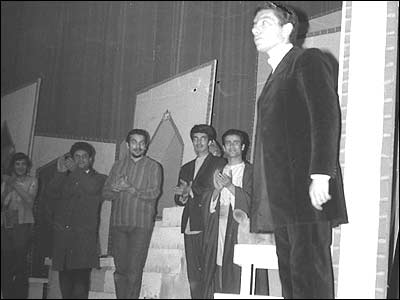 بیژن مفید پس از اجرای تئاتر